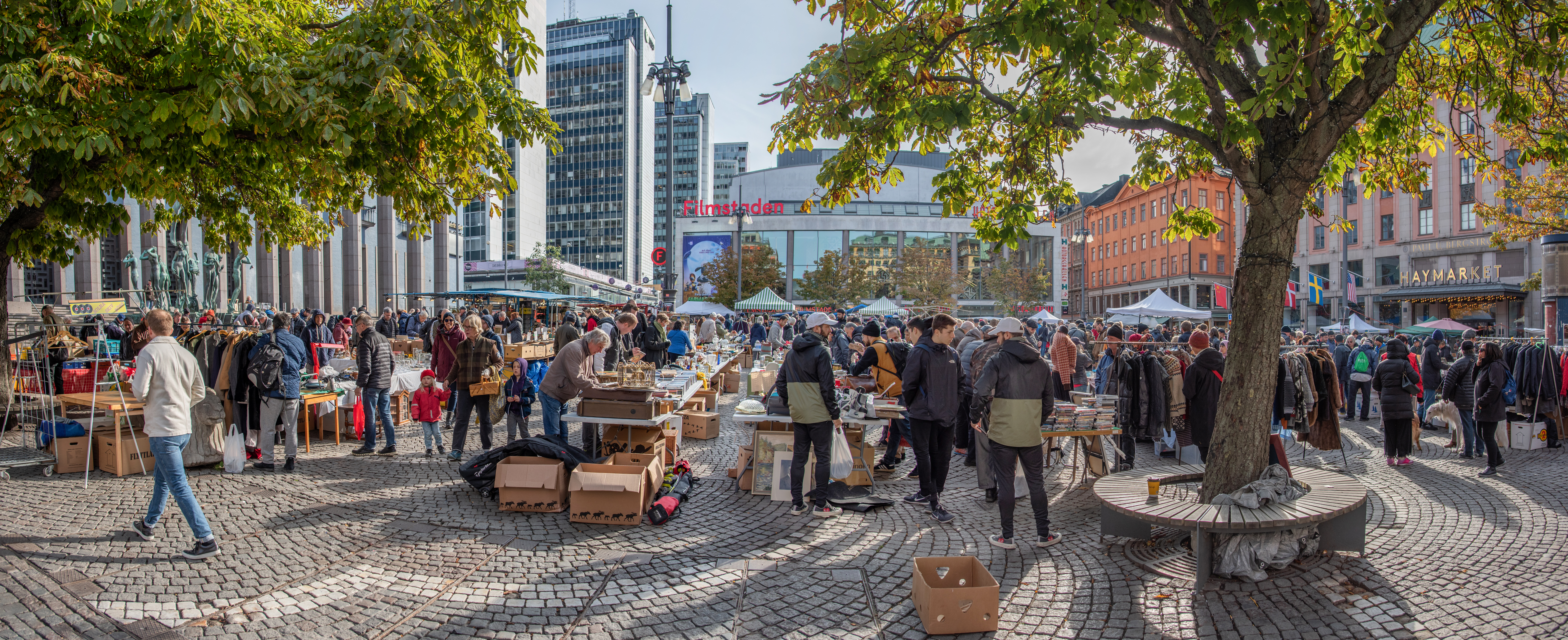 Hötorget, Stockholm, Sweden, October 2019